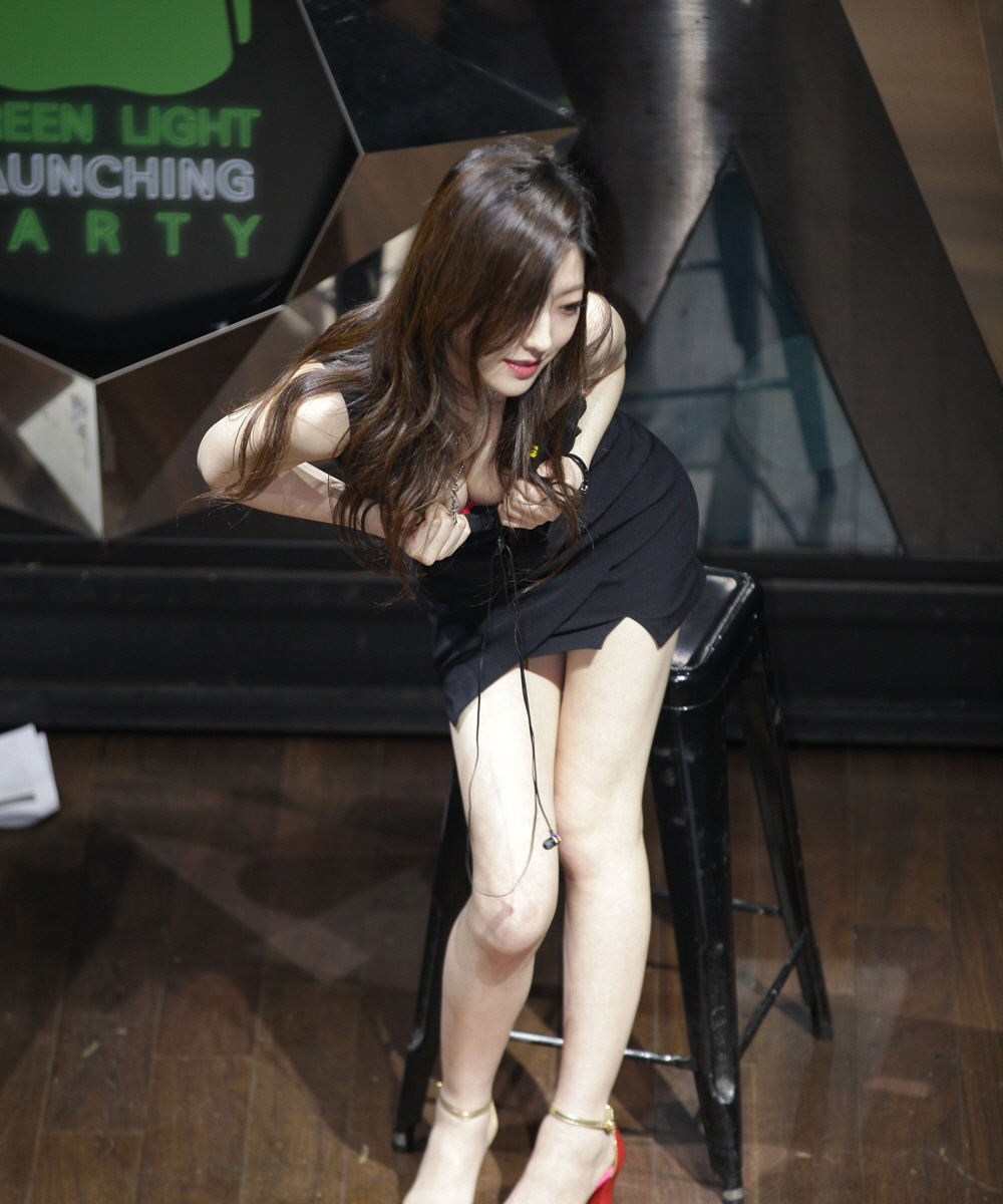 하네다 아이(Ai Haneda) 팬미팅